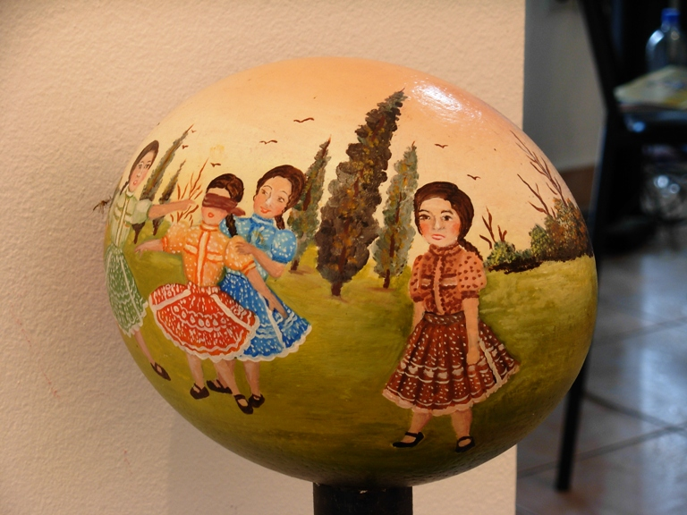 Oslikano nojevo jaje. Galerija "Babka" Kovačica